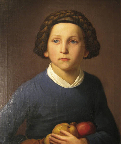 Portrait eines Mädchens